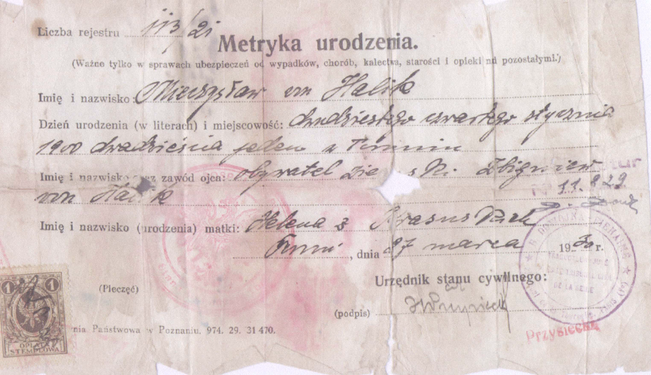 Metryka urodzenia Tony Halika.